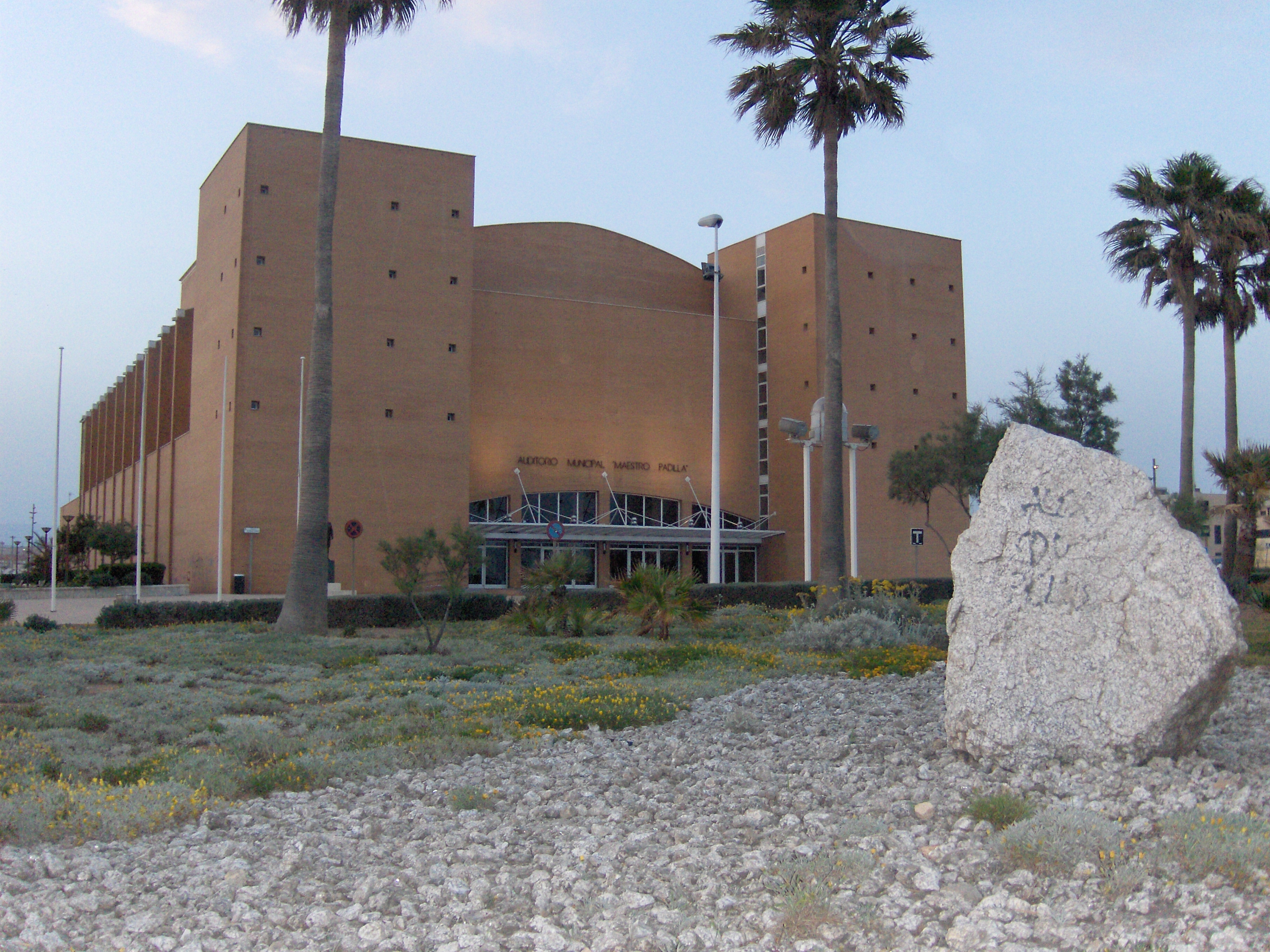 Auditorio municipal Maestro Padilla, en Almería